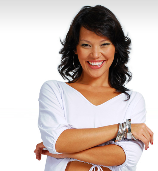 Atriz e apresentadora Geovana Tominaga